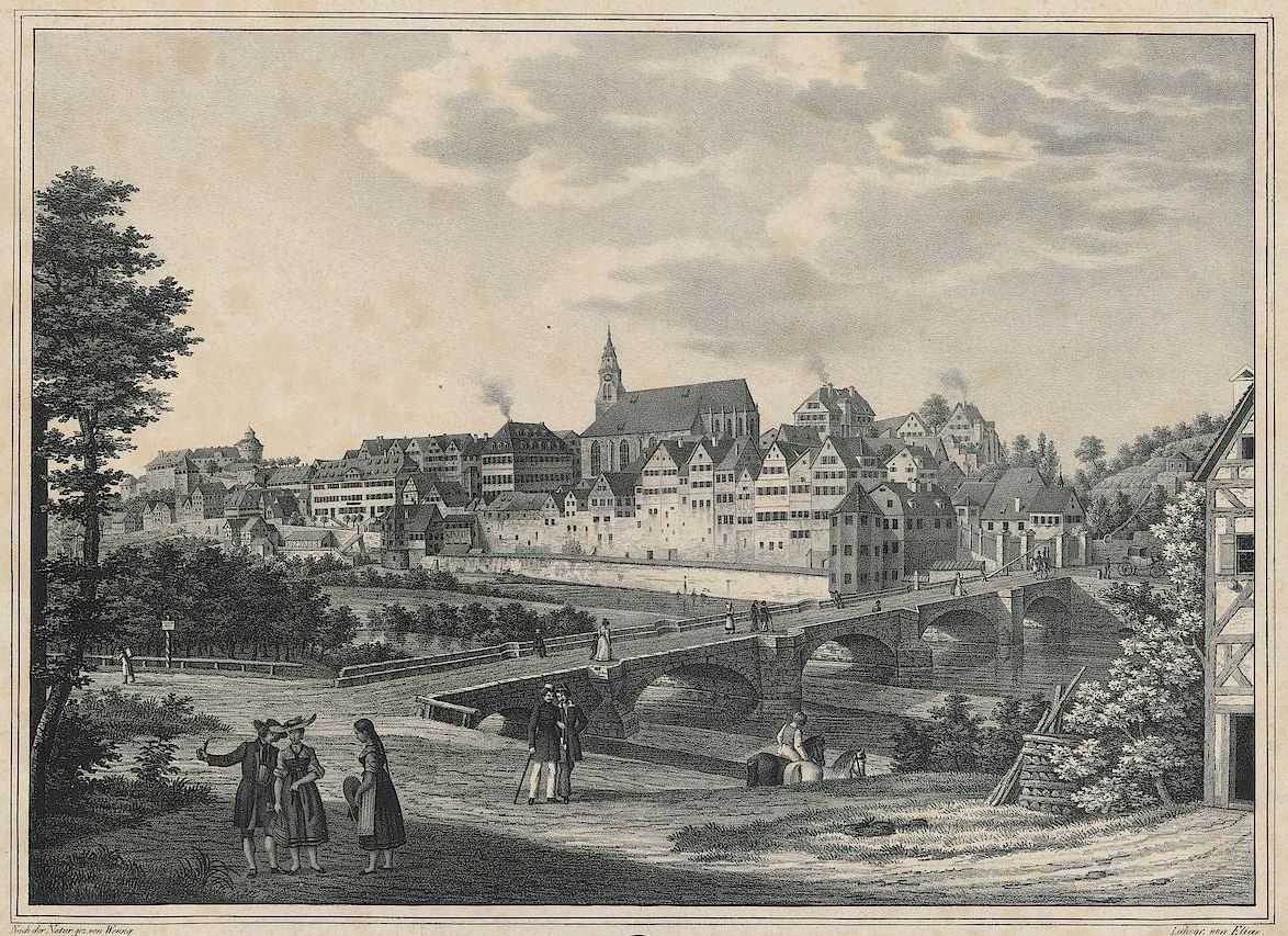 Tübingen. Lithographie von Karl Heinrich Wenng und Friedrich Bernhard Elias im Verlag Georg Ebner, Stuttgart, um 1835